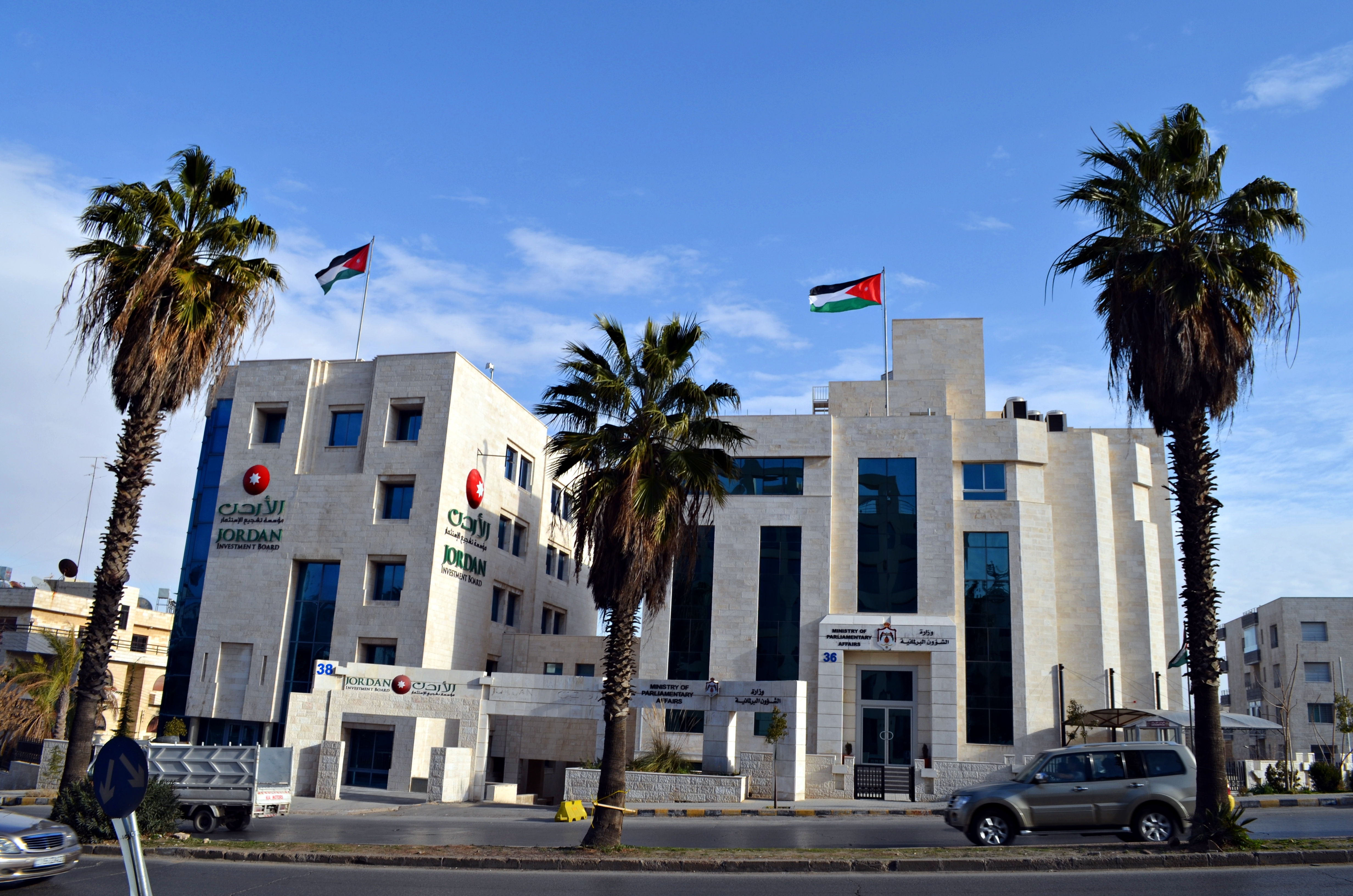 وزراة الشئون البرلمانية، الأردن.